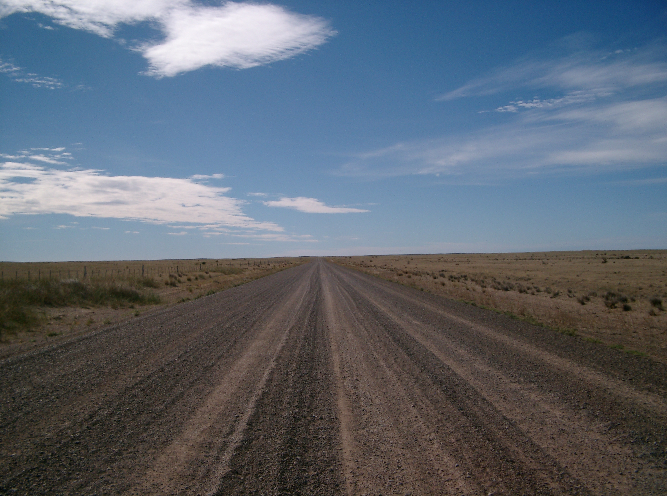 Von mir selbst aufgenommen und unter Public Domain gestellt.